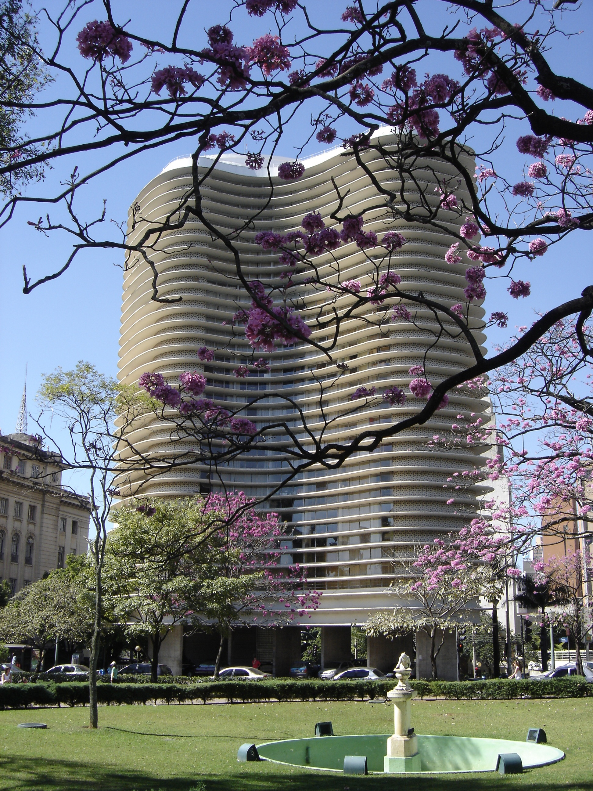 Ipê na Praça da Liberdade 2 By Sergio Cirino 2006